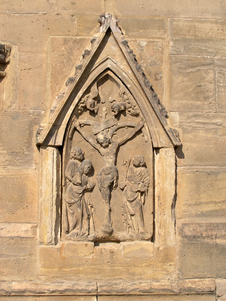 Kreuzigungsrelief am südlichen Querhaus der Peterskirche in Erfurt